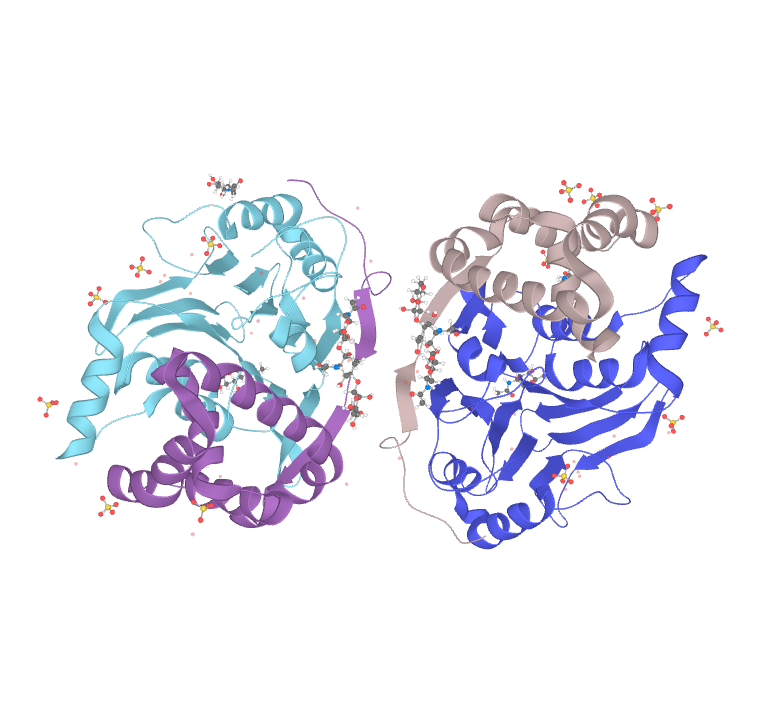 Representació de l'enzim àcid ceramidasa extreta de la base de dades Uniprot.